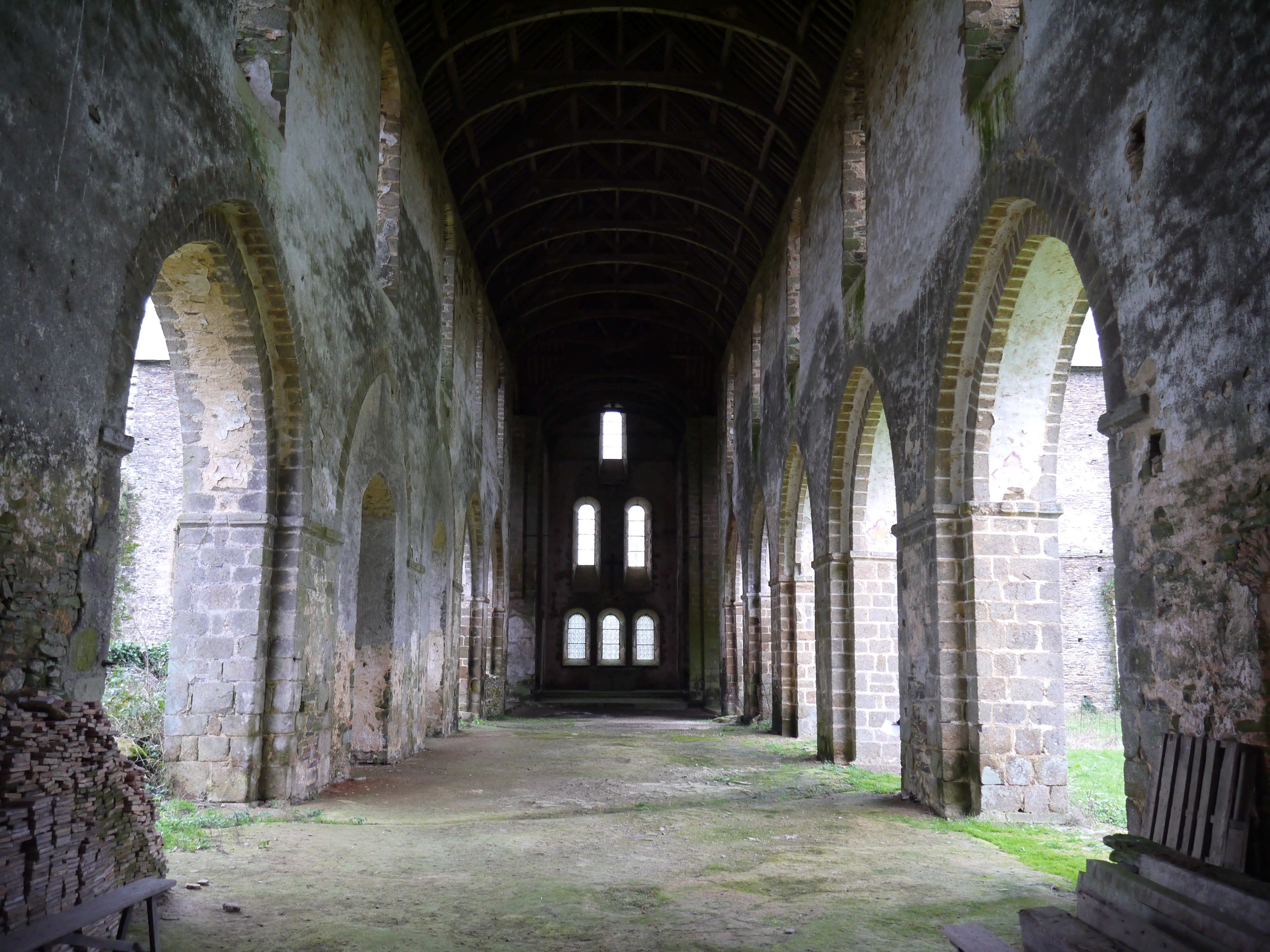 Nef de l'abbatiale